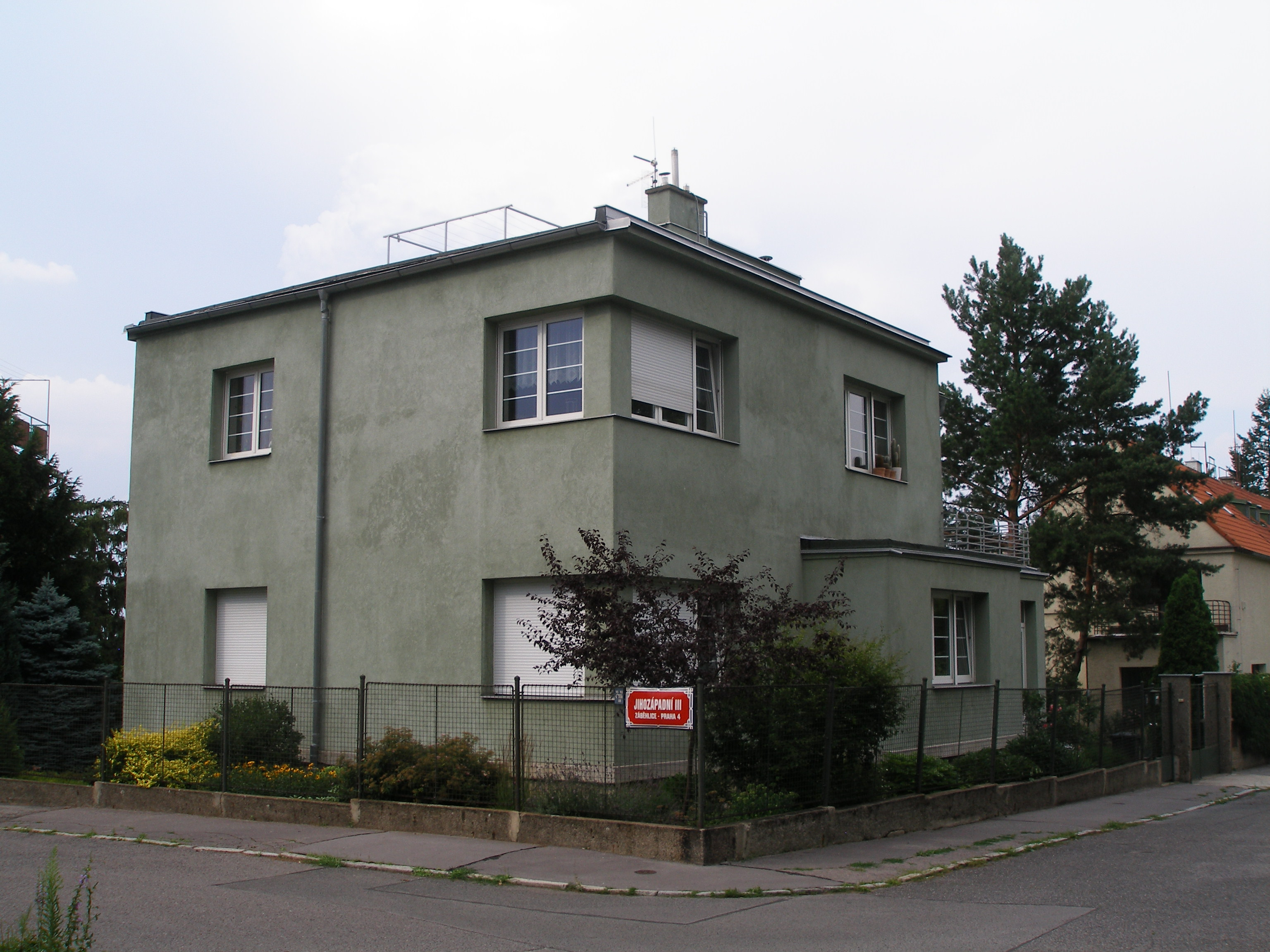 Vila na pražském Spořilově, v níž bydlíval Vilém Pospíšil.